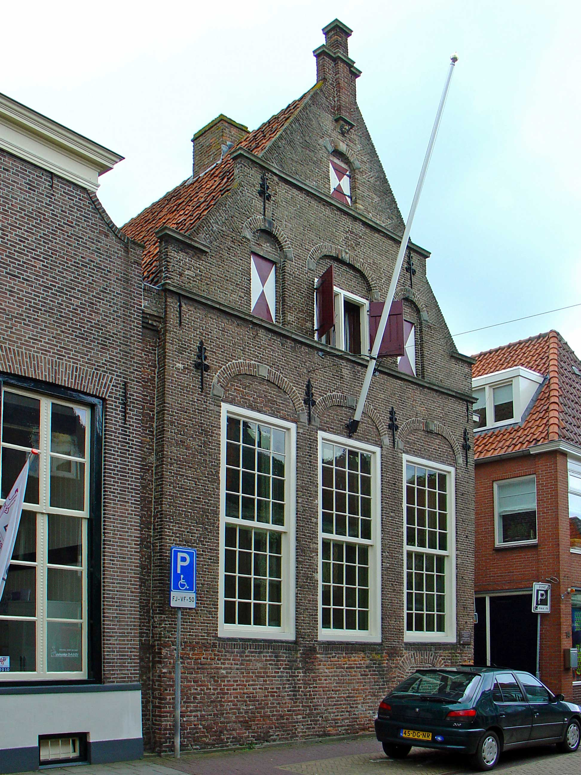 Hoogstraat 12 in Hasselt (Overijssel)